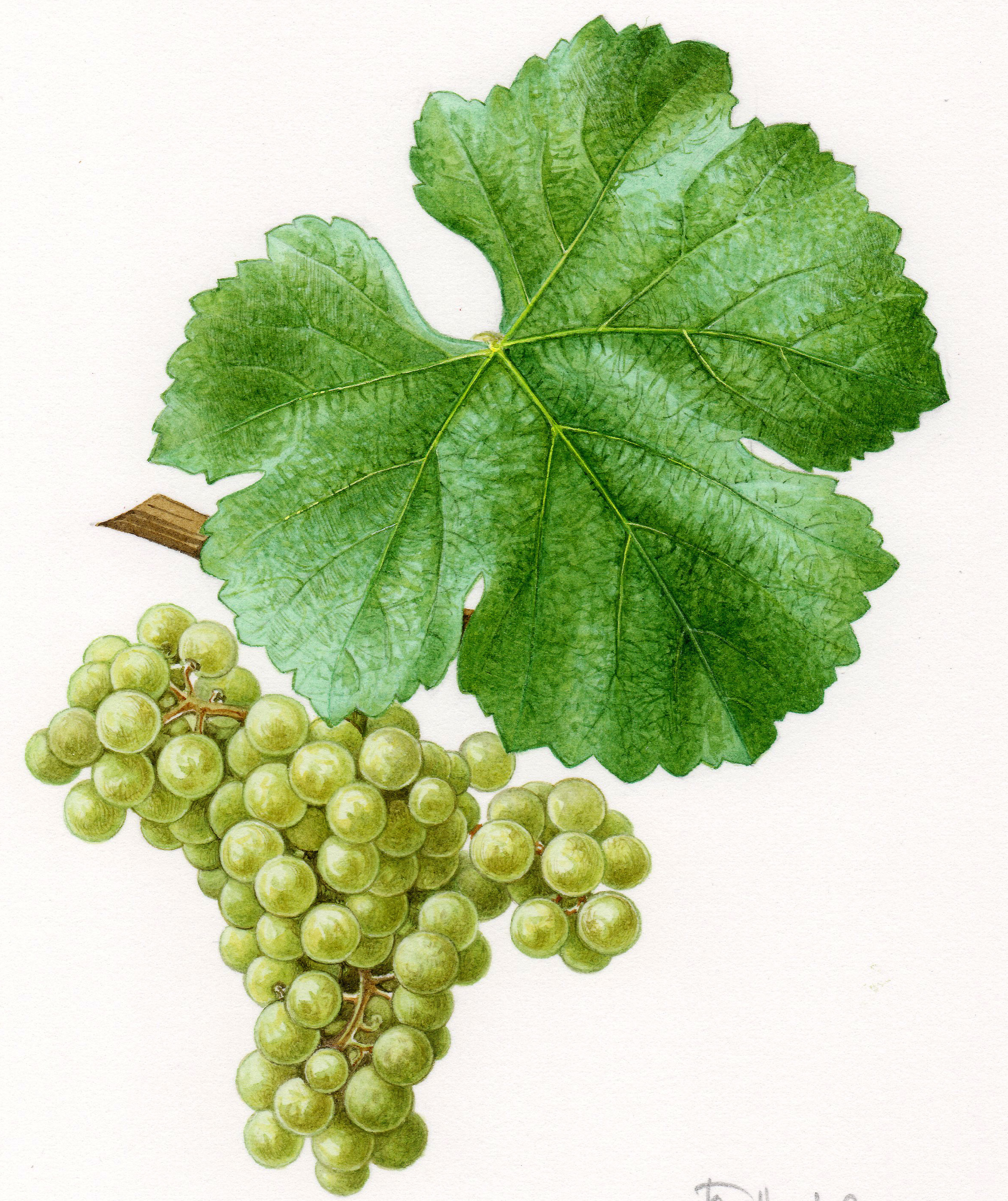 Aquarelles originales pour le Cépages de France (2001)